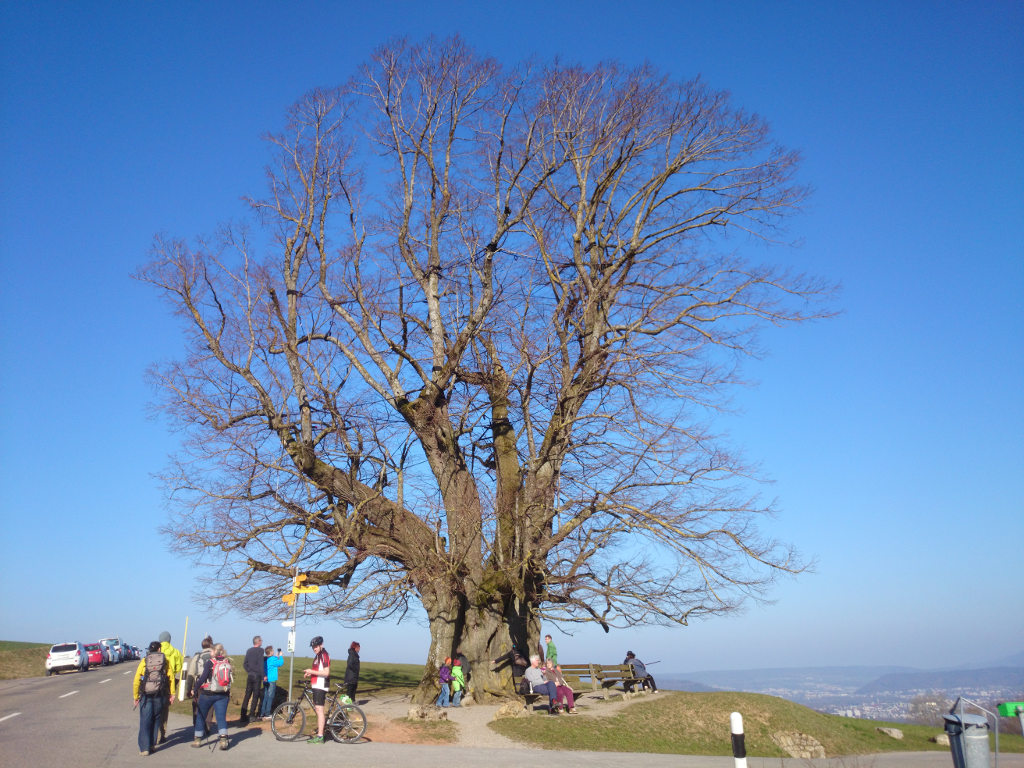 Linde von Linn, Linn AG, Schweiz. Einer der ältesten Bäume der Schweiz.